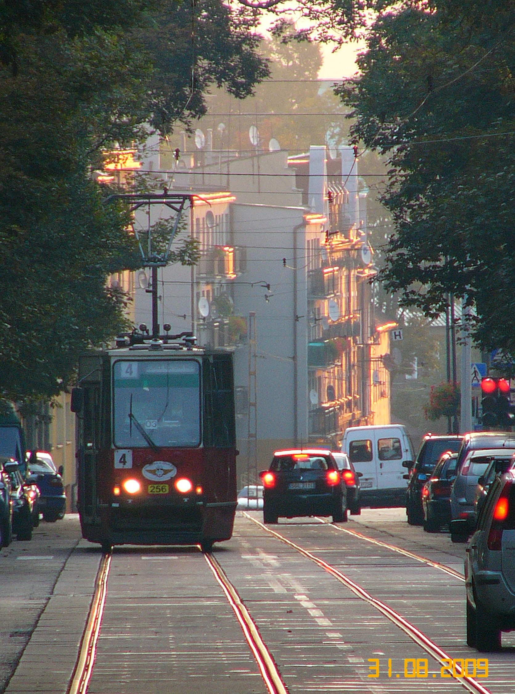 Nach 117 Jahren geht die Geschichte der Gleiwitzer Straßenbahnen zu Ende. Ab dem 01.09.2009 entlang der ehemaligen Linie 4 werden Busse mit der Nummer A4 fahren.